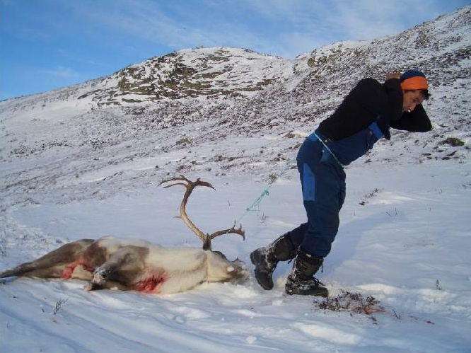 Hunter dragging a reindeer